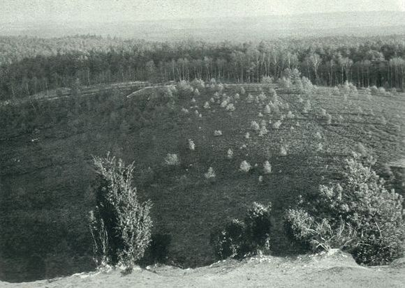 Originalbeschreibung: Im Totengrund bei Wilsede. Gletscherseebildung. Aus dem Banngebiet